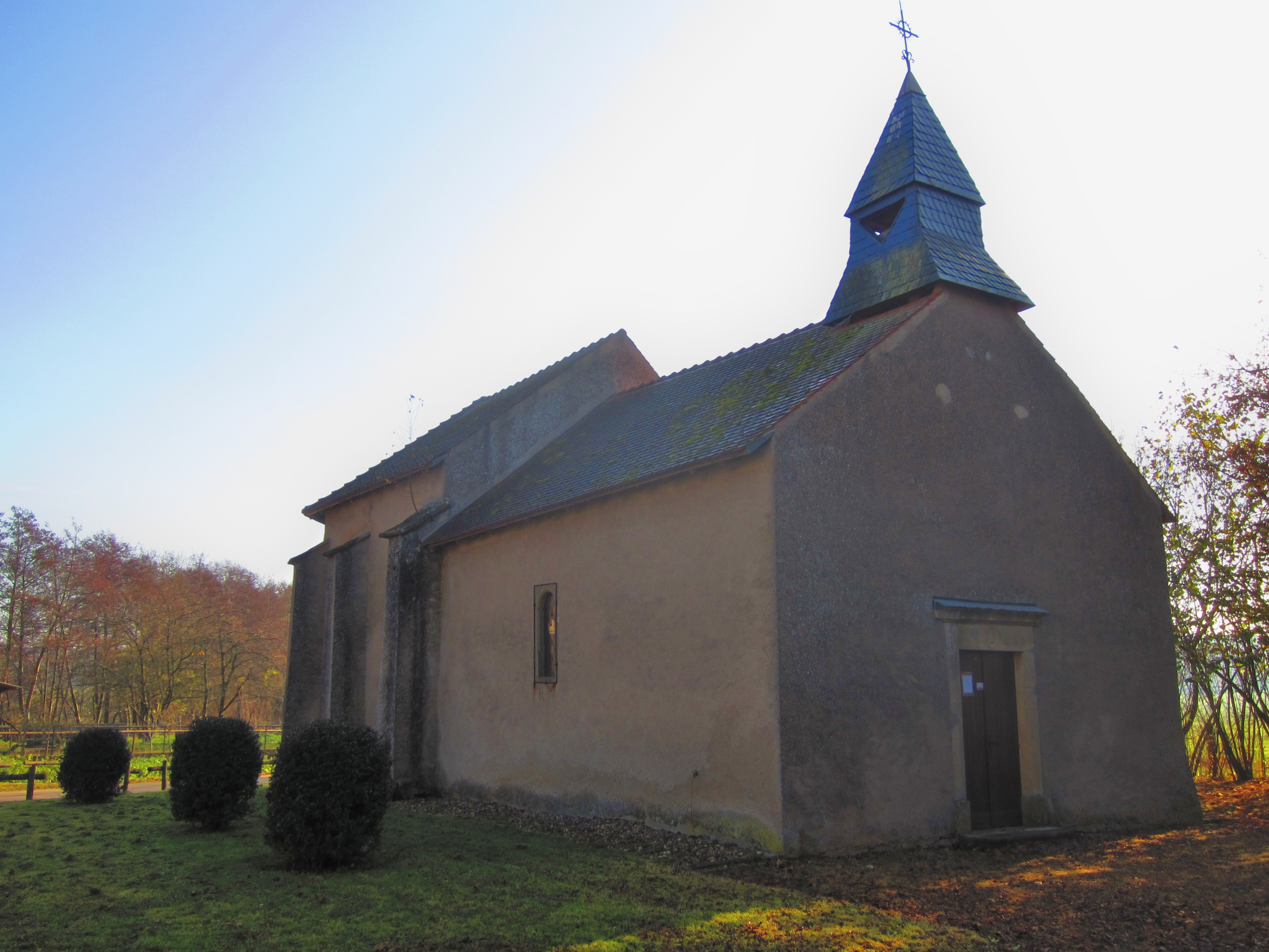 Description Chapelle Sainte-Barbe Chapelle Sainte-Barbe